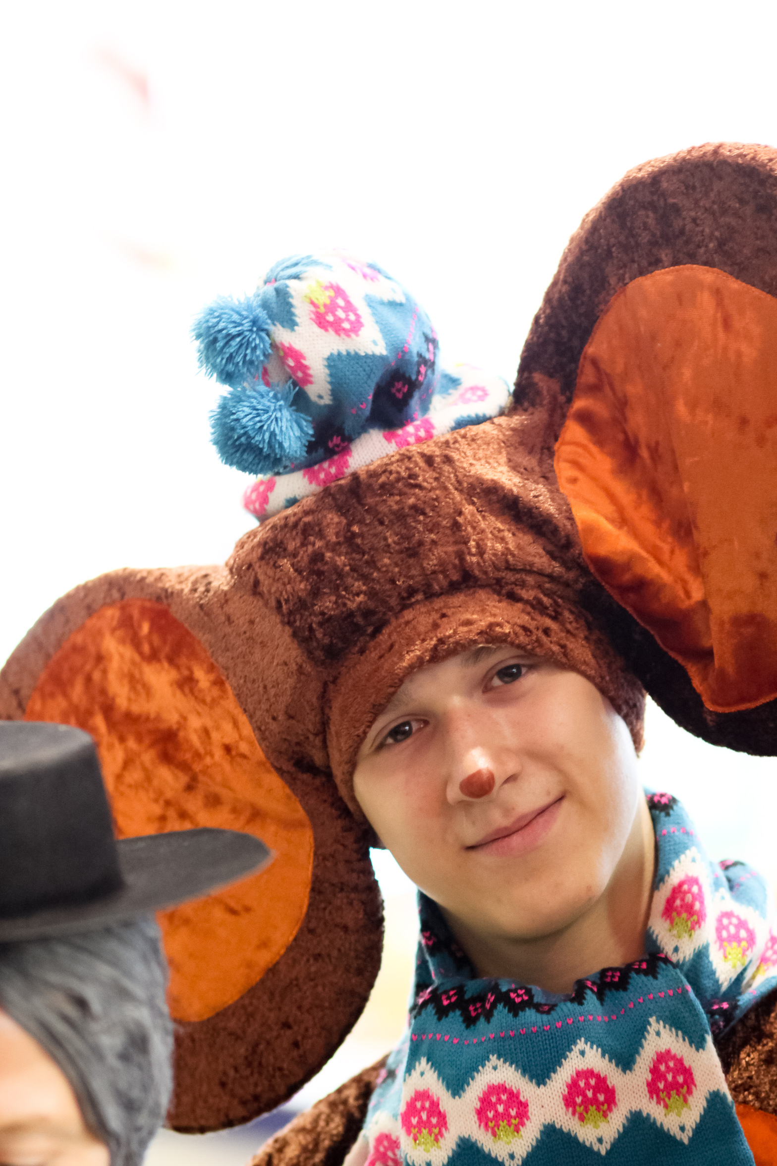 Чебурашка на ММКВЯ-2011